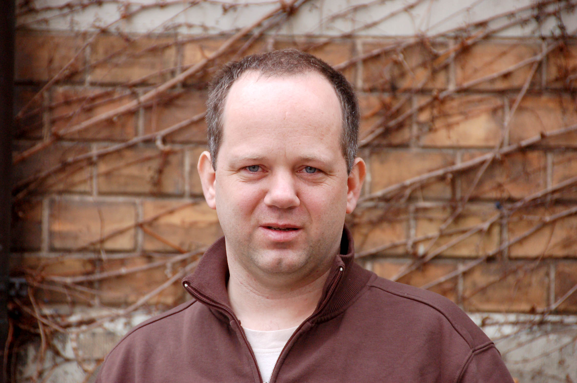 Offizielles Pressefoto von Monty Schädel